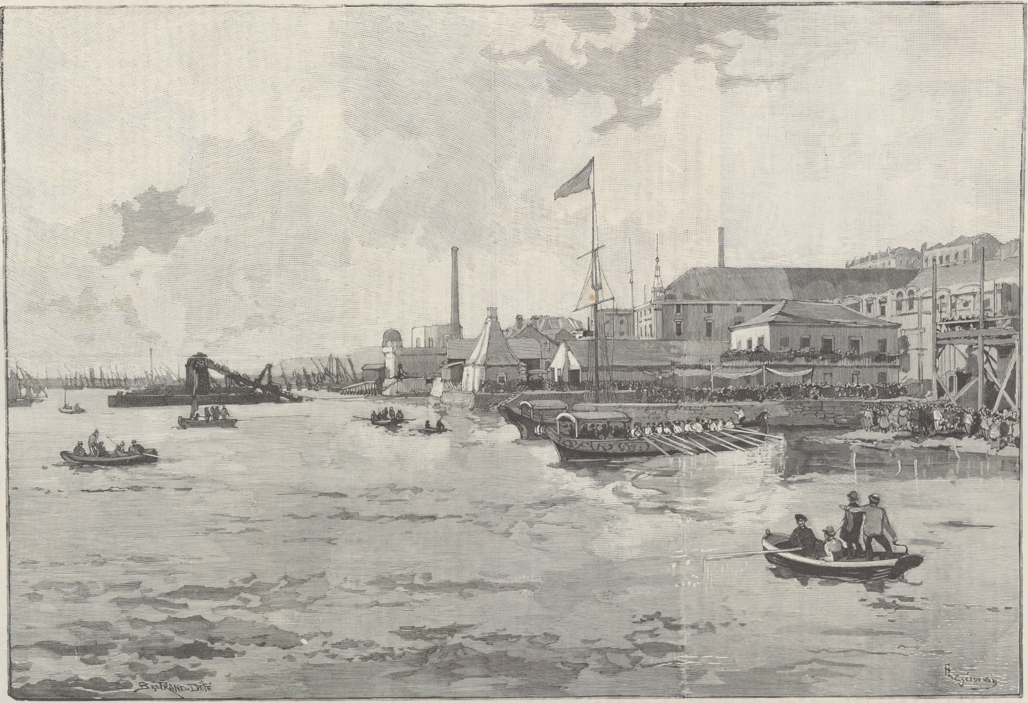 La Revolution au Brésil. — Débarquement de Dom Pedro, a Lisbonne. — Le canot impérial abordant a l'Arsenal de la Marine (dessin de M Gérardin, d'après la photographie instantanée de M. Bobone, a Lisbonne).